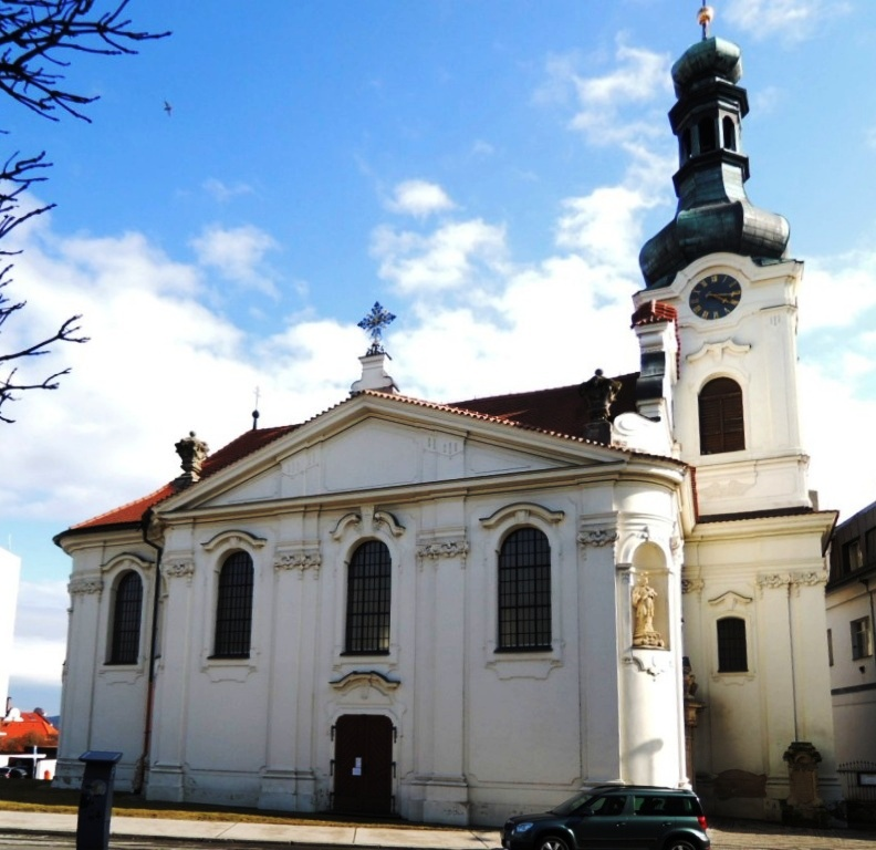 Mladá Boleslav church of St. John Nepomucene